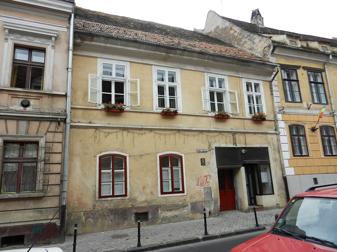 Casa Gottlieb Fleischer